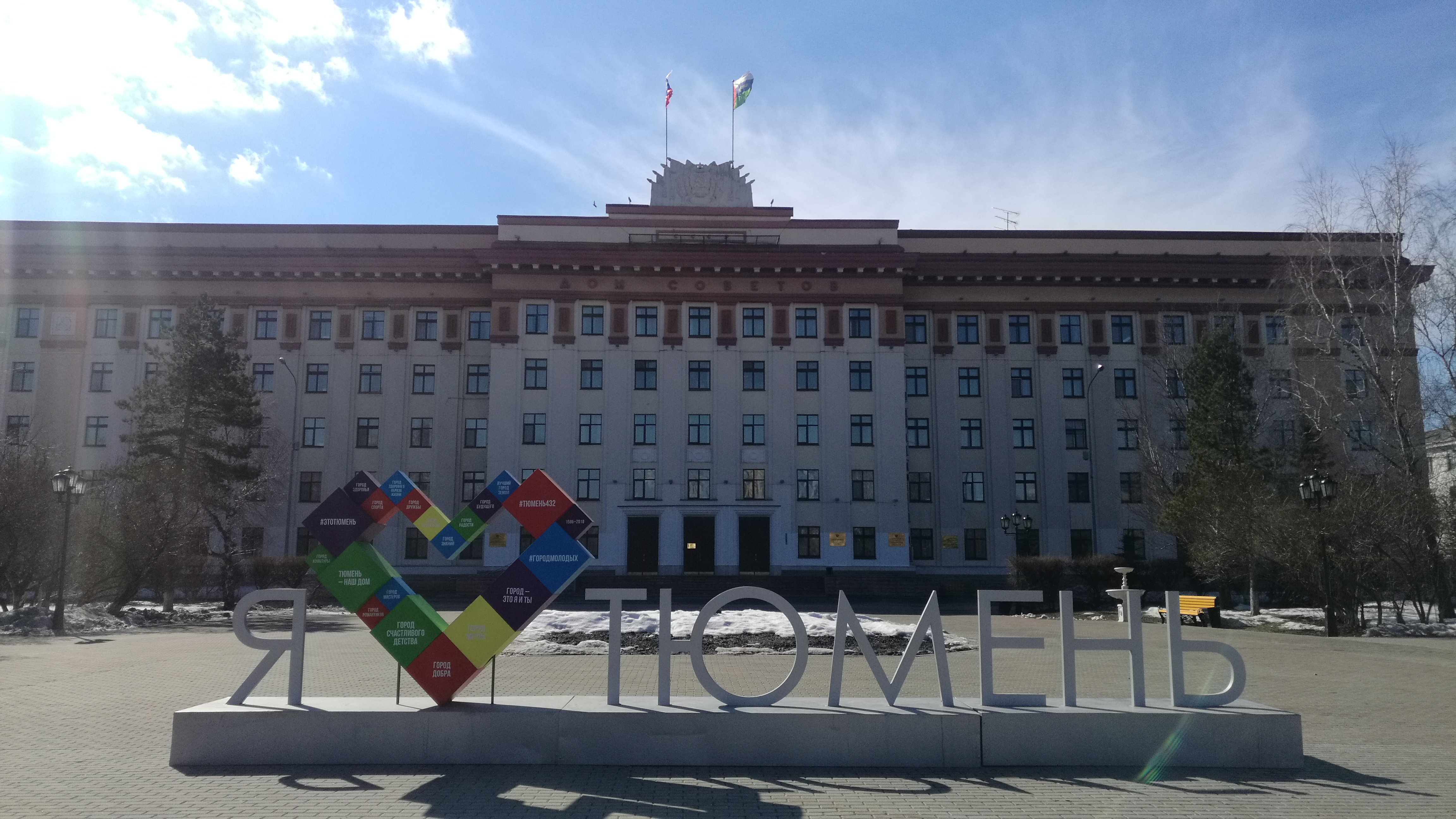 La Tjumena Provinca Dumao. Tjumeno, Rusio.